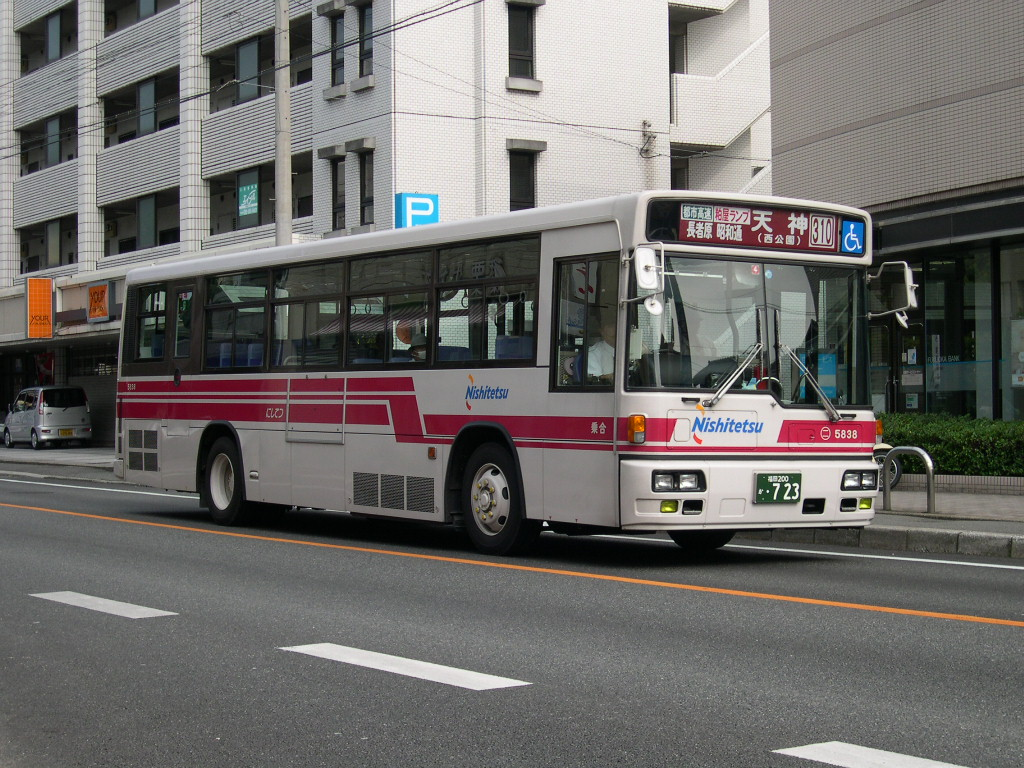 2003-8-23撮影